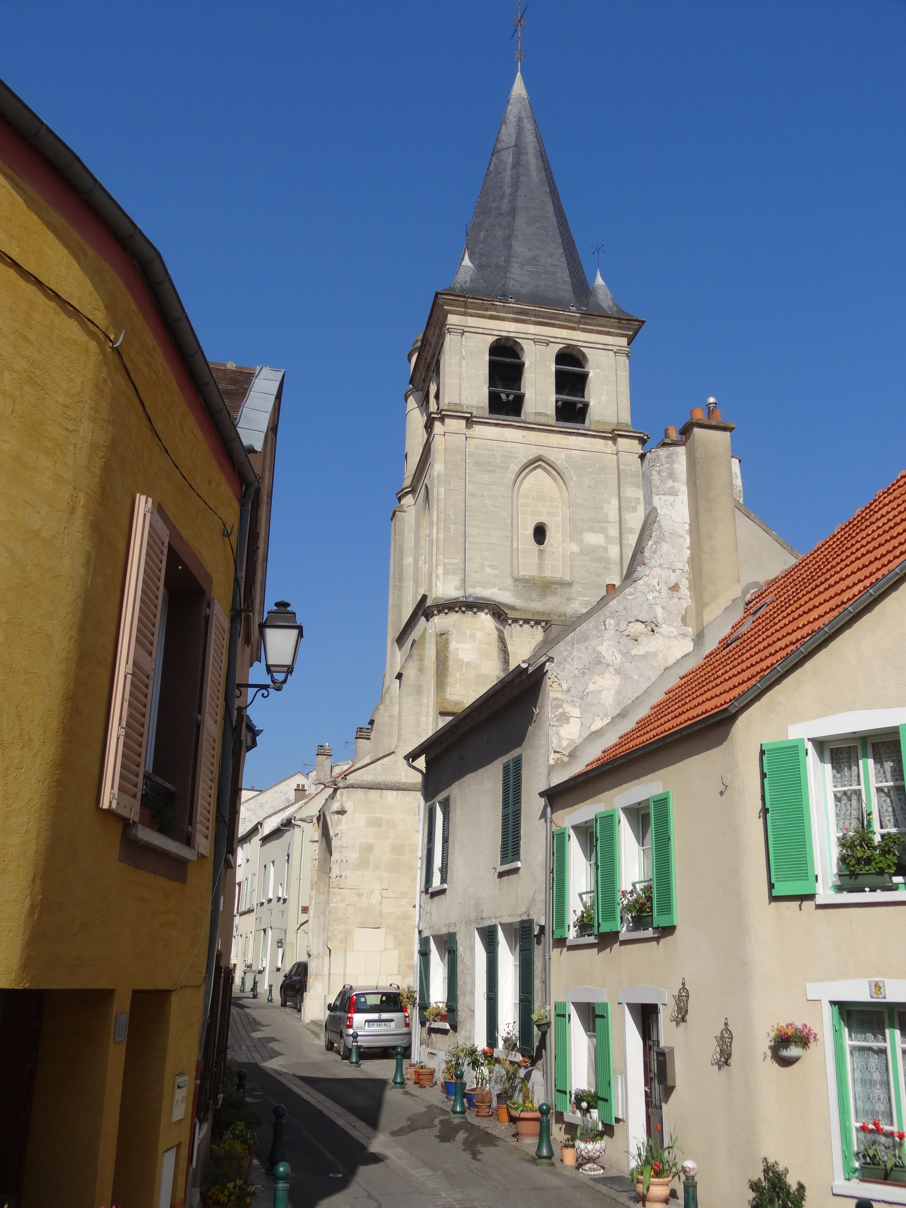 Vue partielle depuis le sud, rue de l'Église.